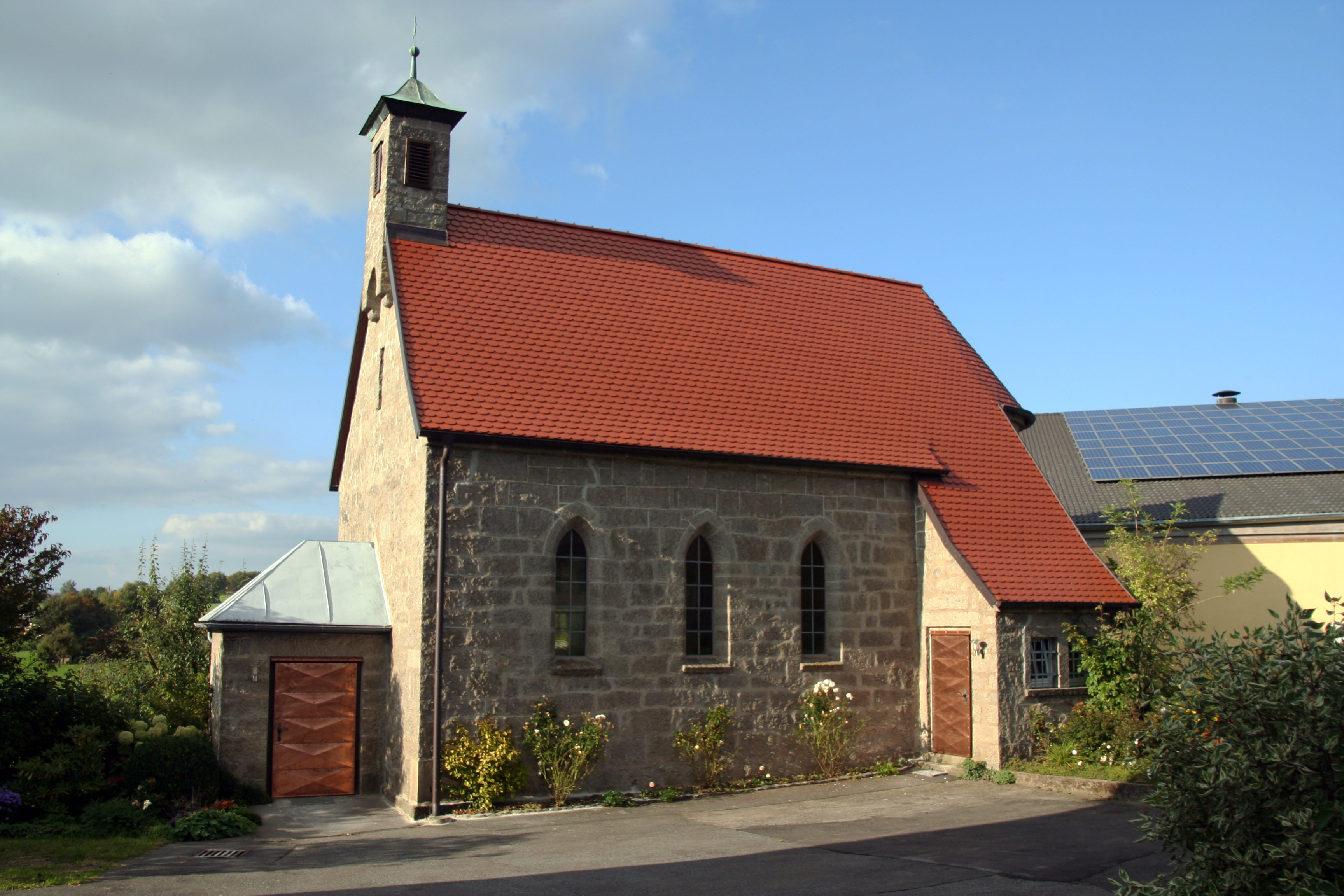 Filialkirche SpielbergThis is a photograph of an architectural monument.